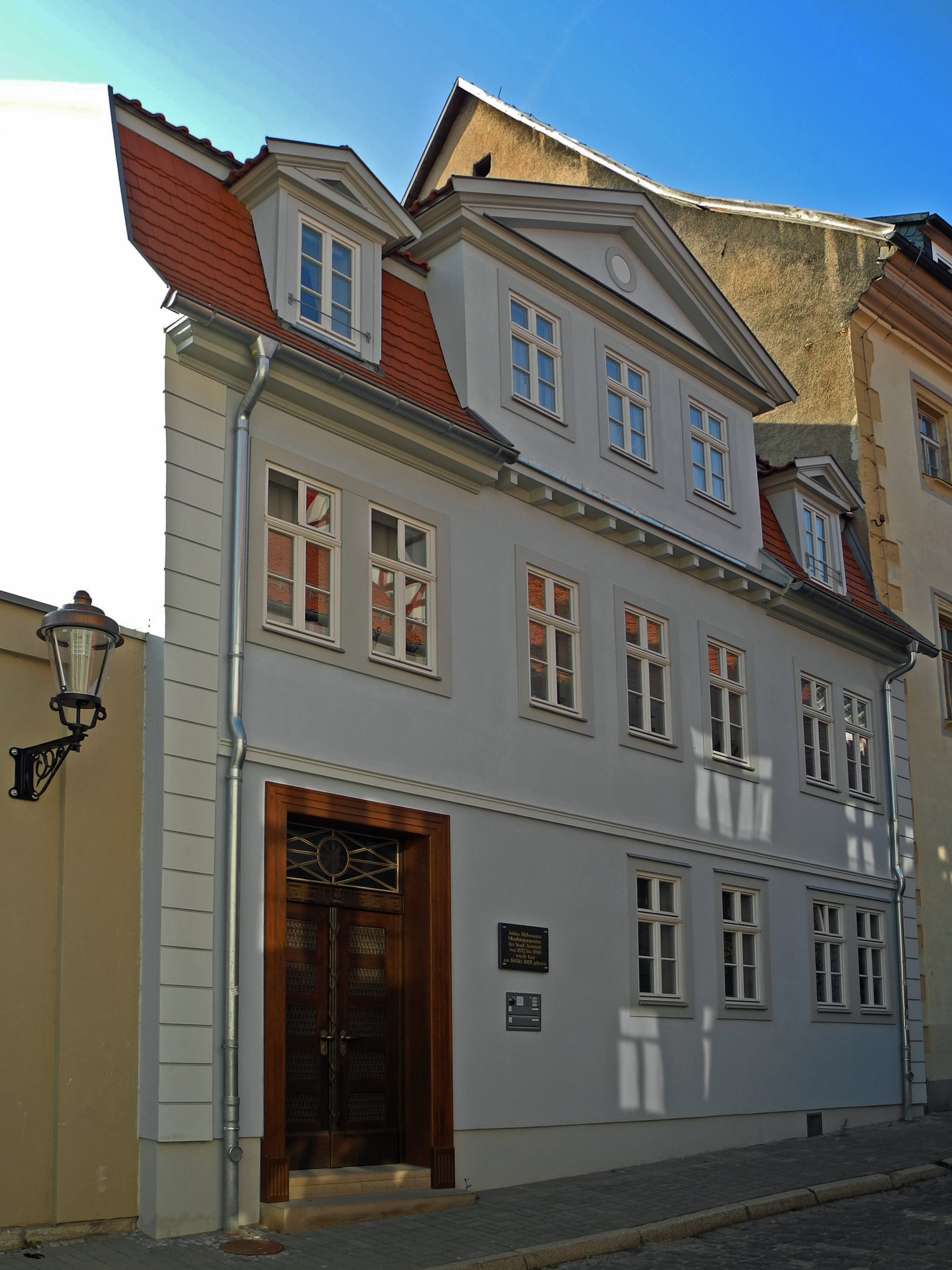 Haus Kohlgasse 2b in Arnstadt (Geburtshaus von Julius Hülsemann)